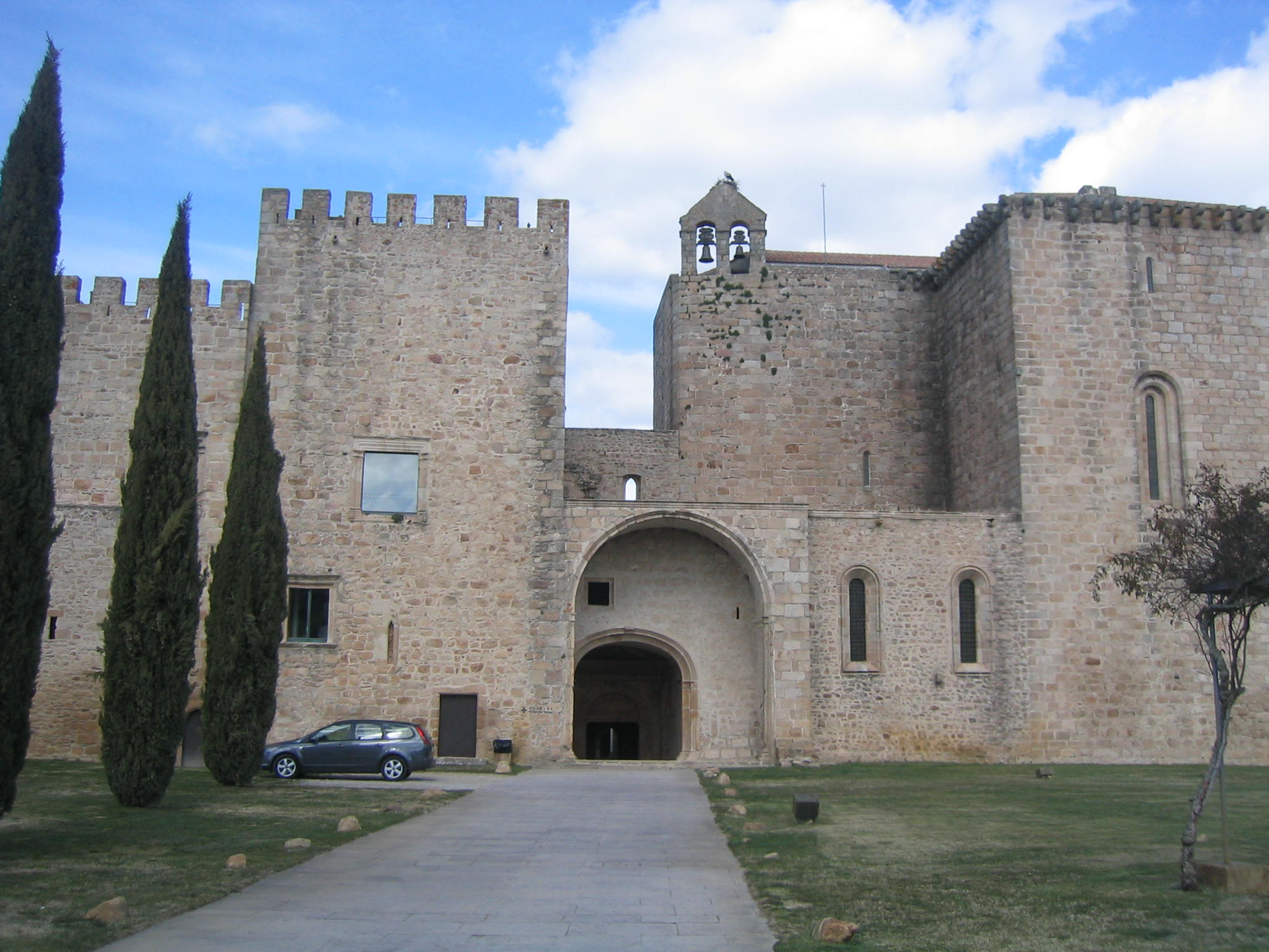 Façade of Flor da Rosa Convent, Crato municipality, Portugal